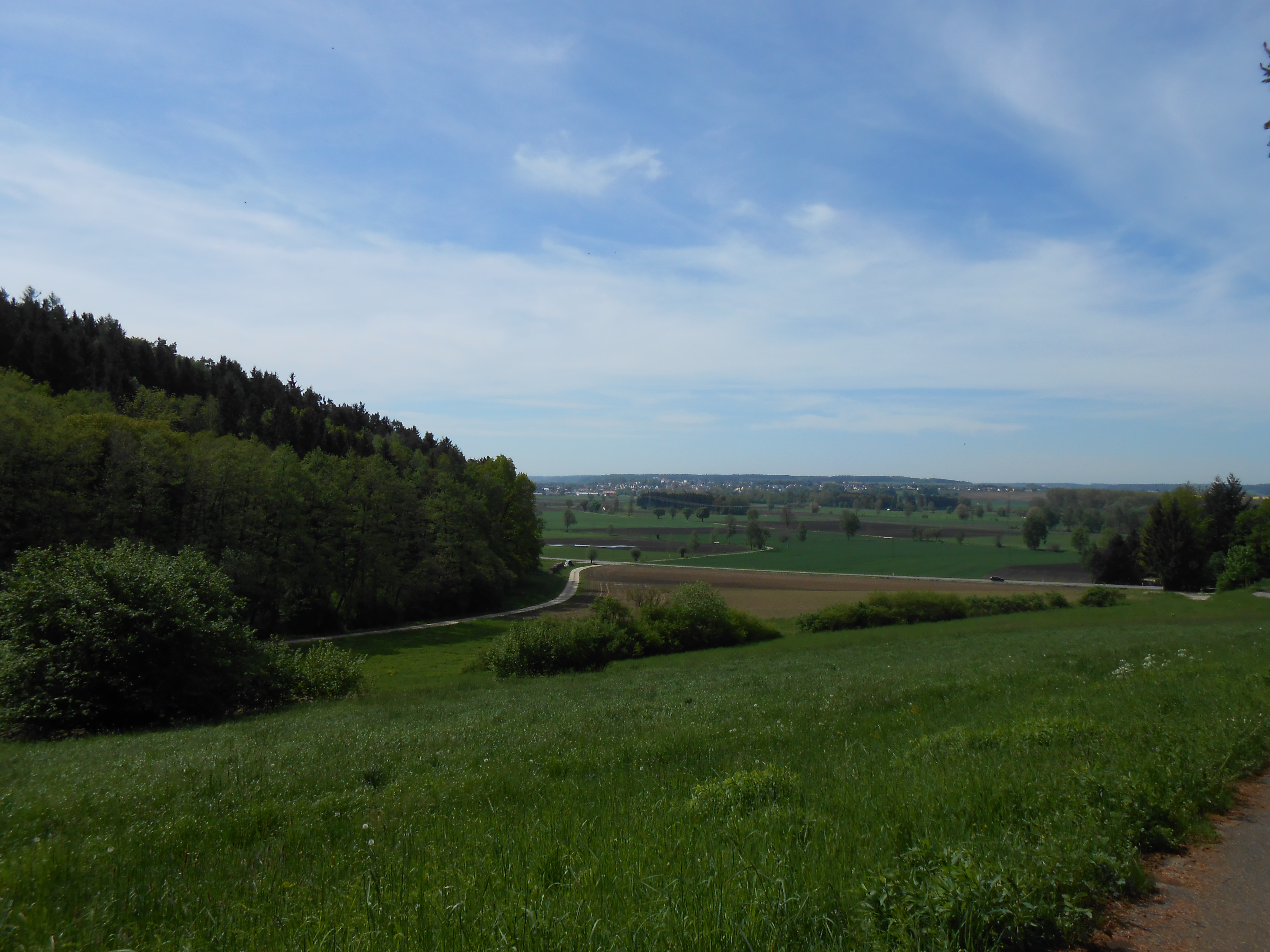 links die Schelmengrube, rechts das Mindeltal mit Burgau